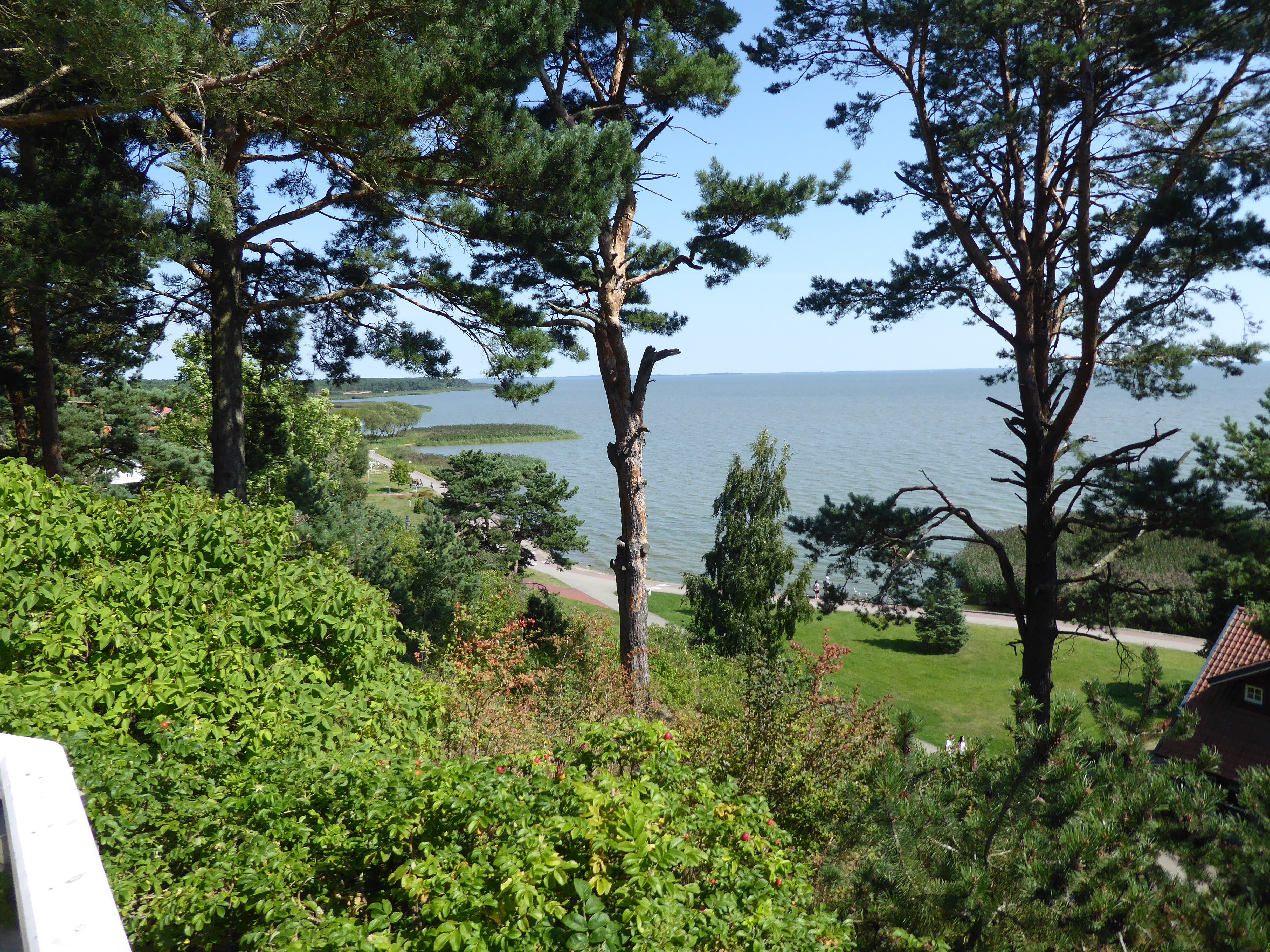 Nida Thomas-Mann-Gedenkstätte Aussicht auf das Haff, von Mann genannter Italienblick